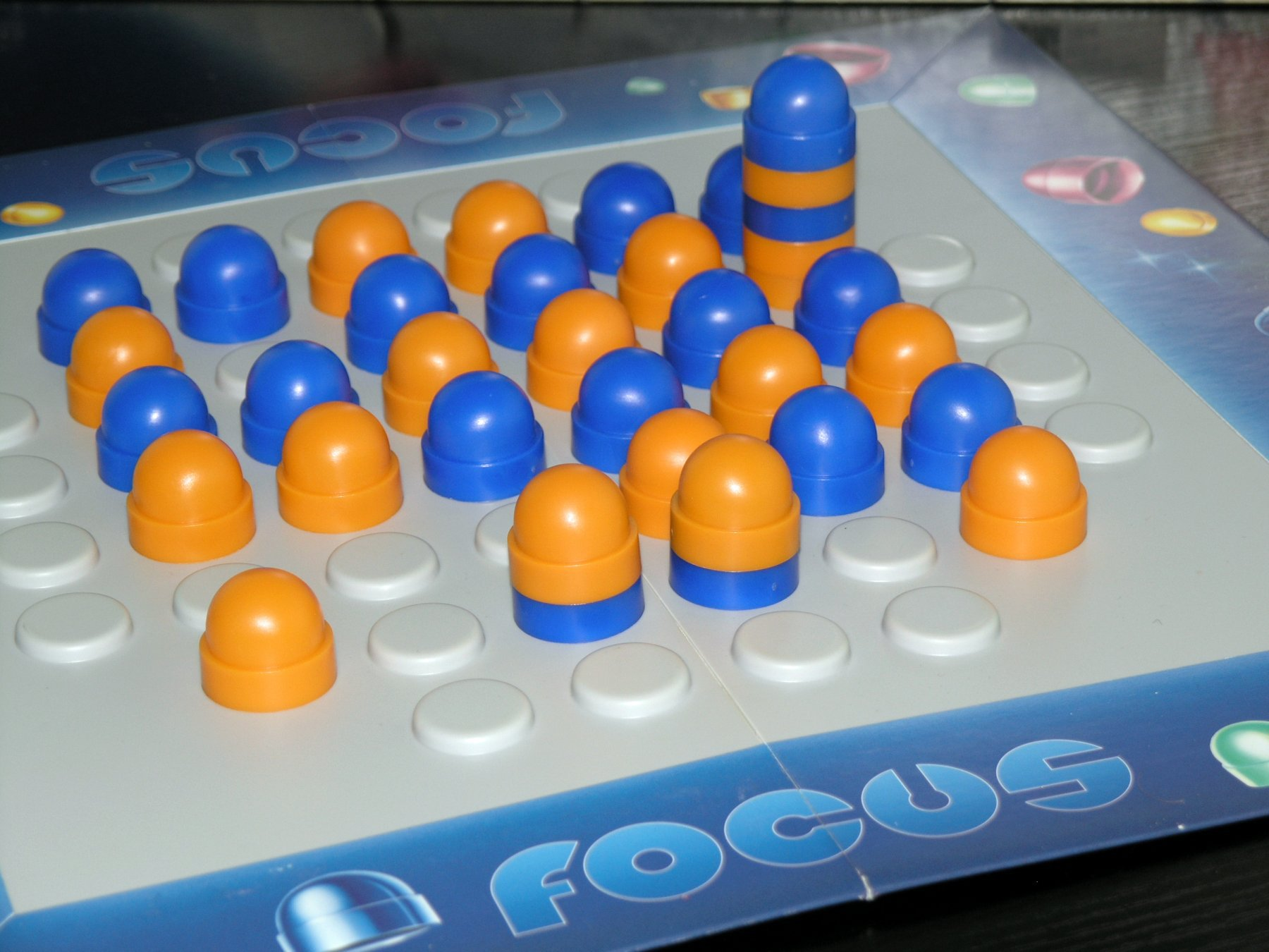 Focus